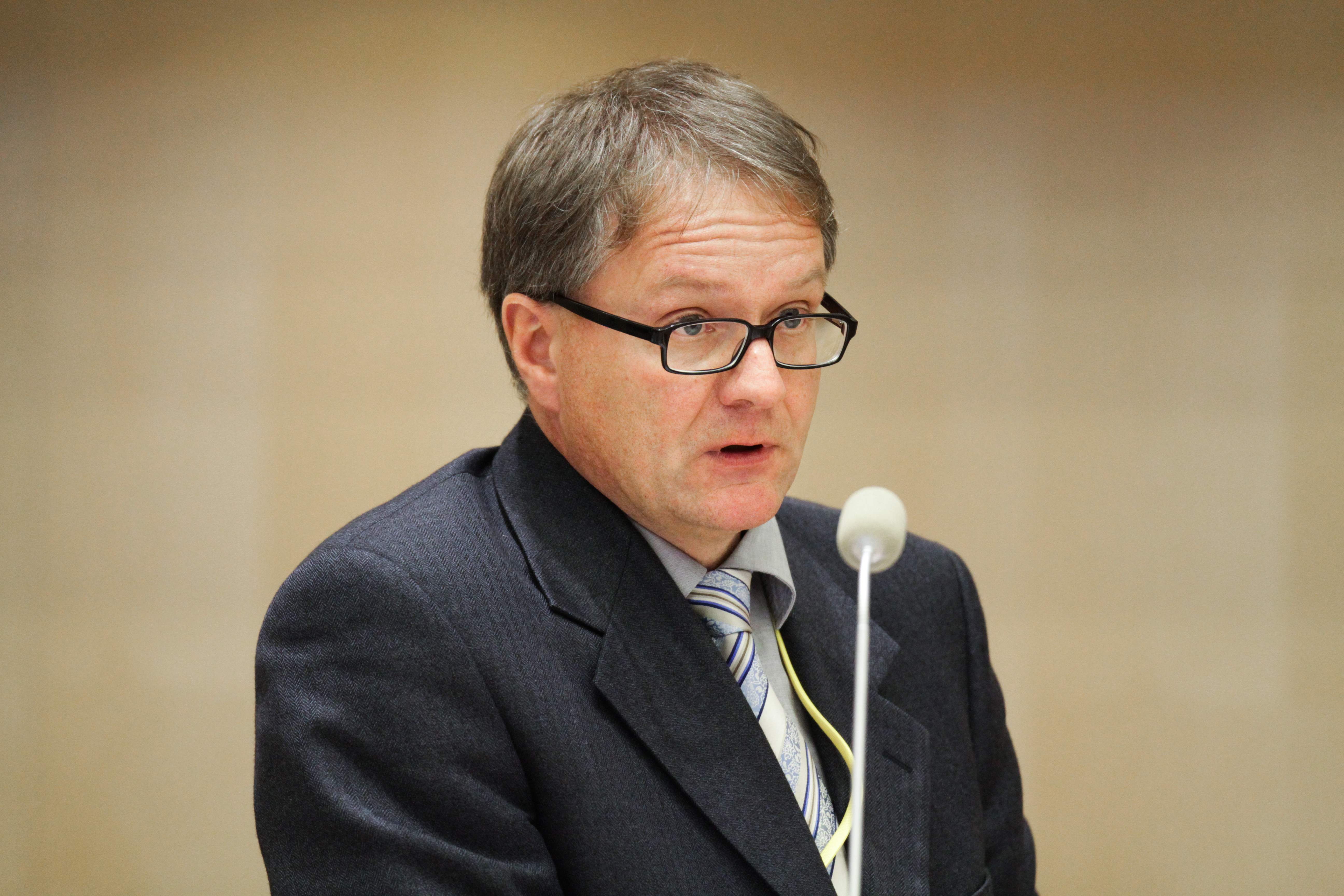 Roger Eriksson vid Nordiska Rådets session i Stockholm 2009